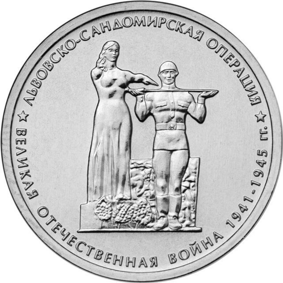 Львовско-Сандомирская операция. Памятная монета Банка России.